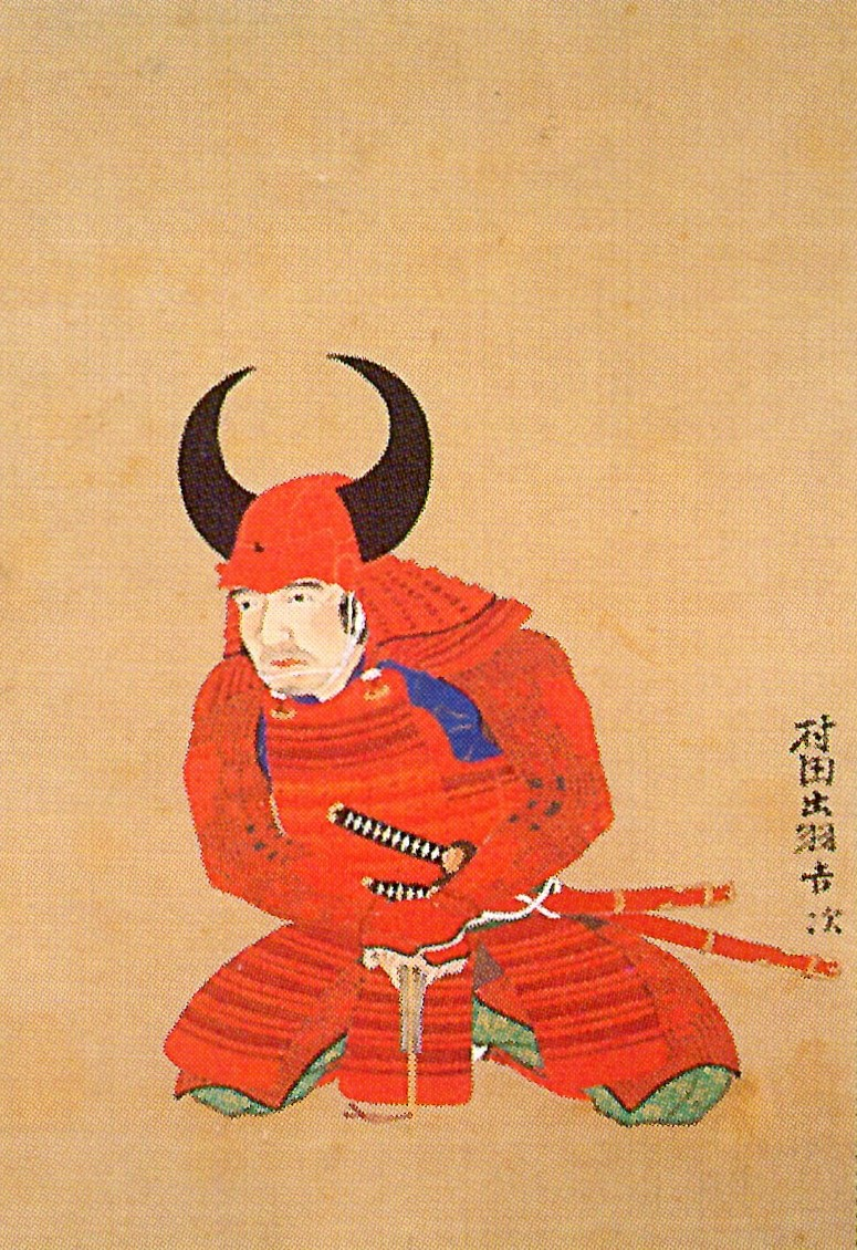 村田吉次の肖像。